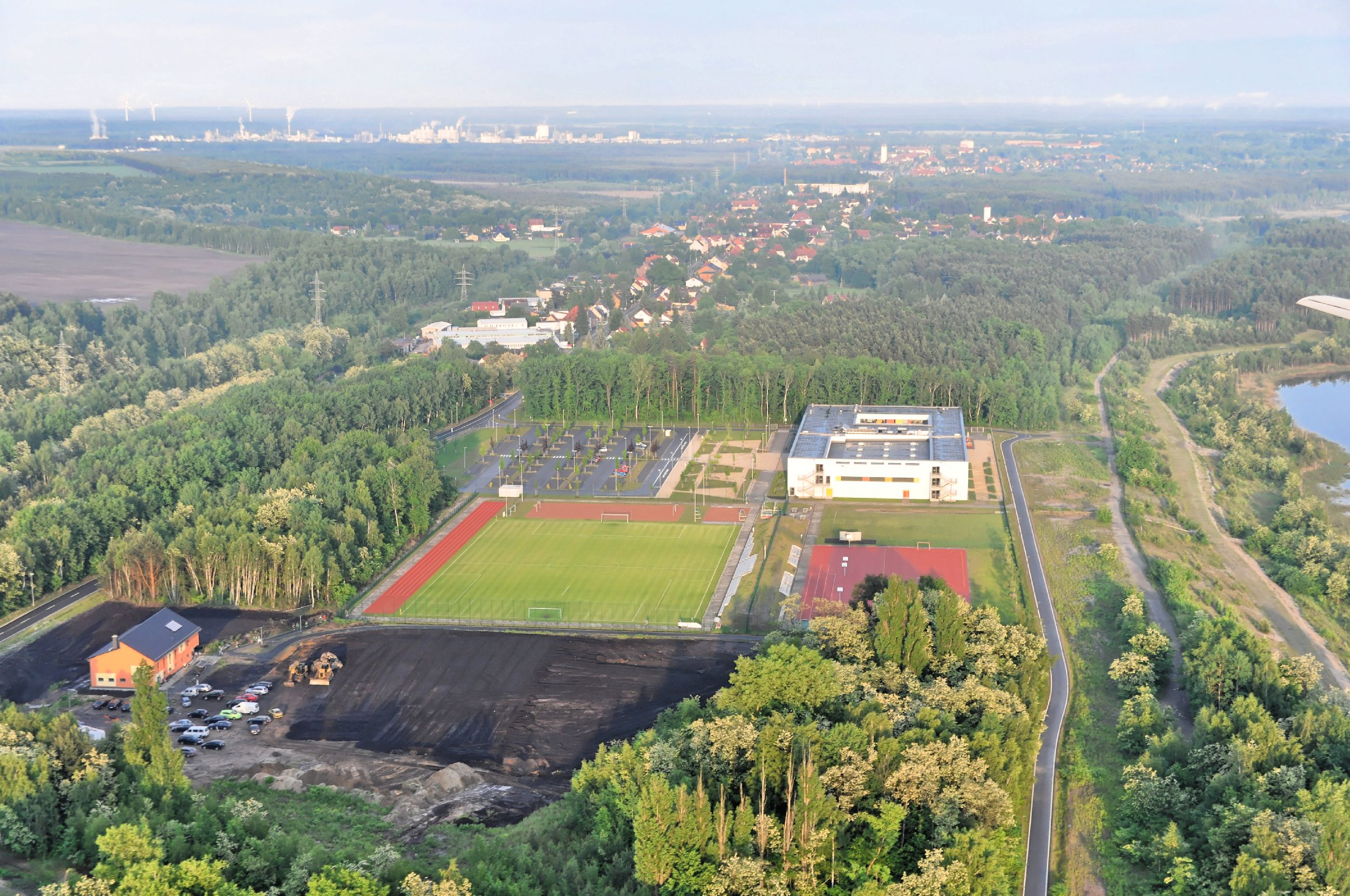 Luftaufnahme SeeCampus Niederlausitz; Überführungsflug vom Flugplatz Nordholz-Spieka über Lüneburg, Potsdam zum Flugplatz Schwarzheide-Schipkau